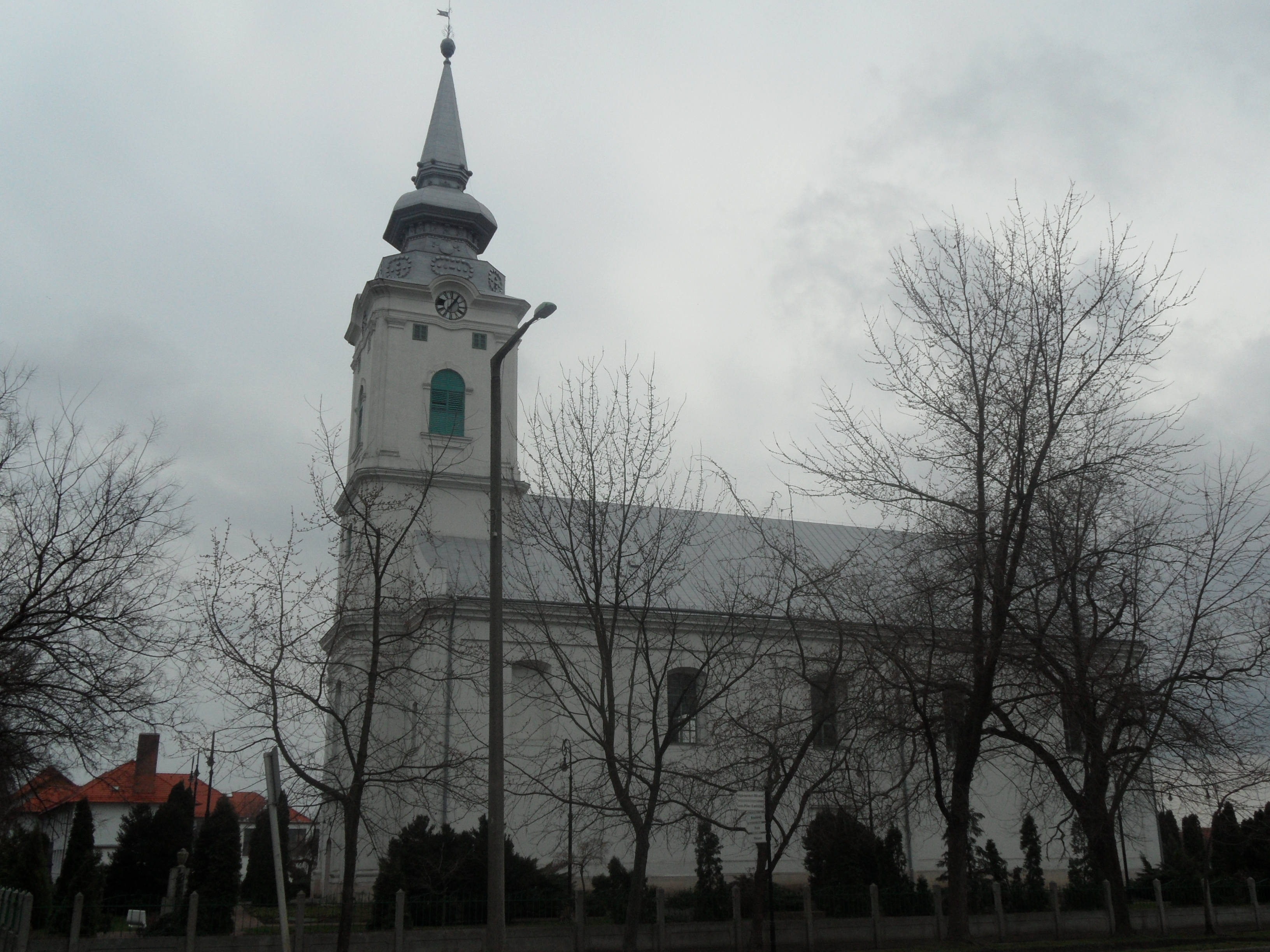 Református templom, Balmazújváros